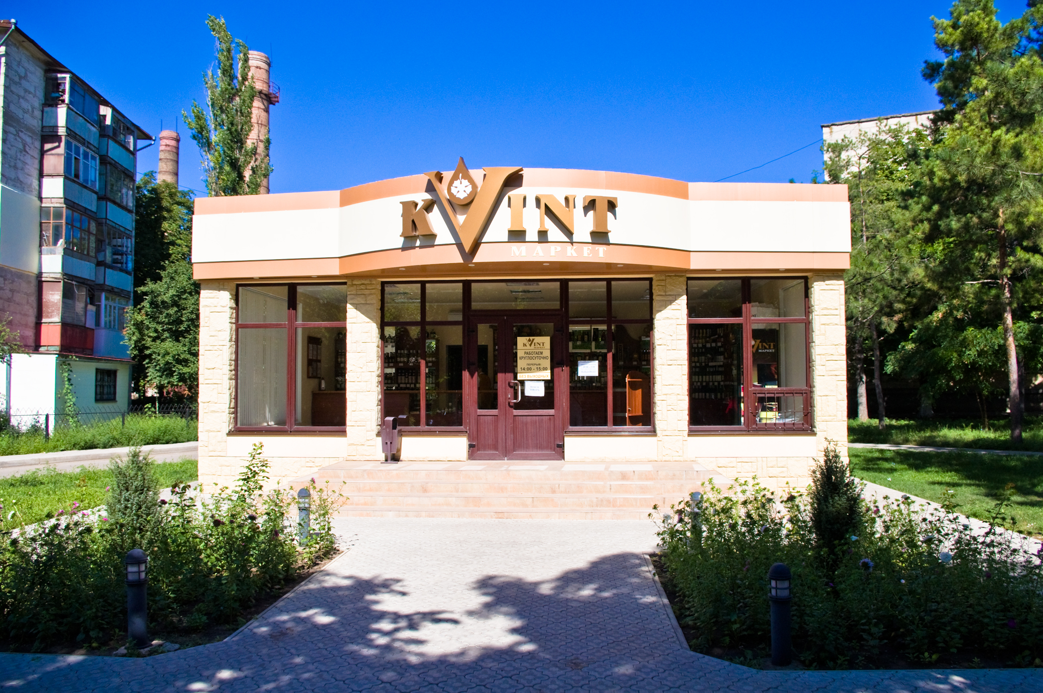 Магазин Квинт в Тирасполе, м-н Октябрьский ("Балка").